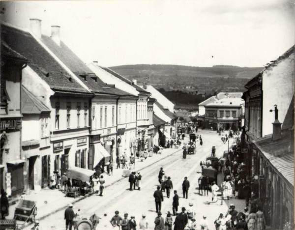 A kolozsvári Wesselényi utca 1887-ben